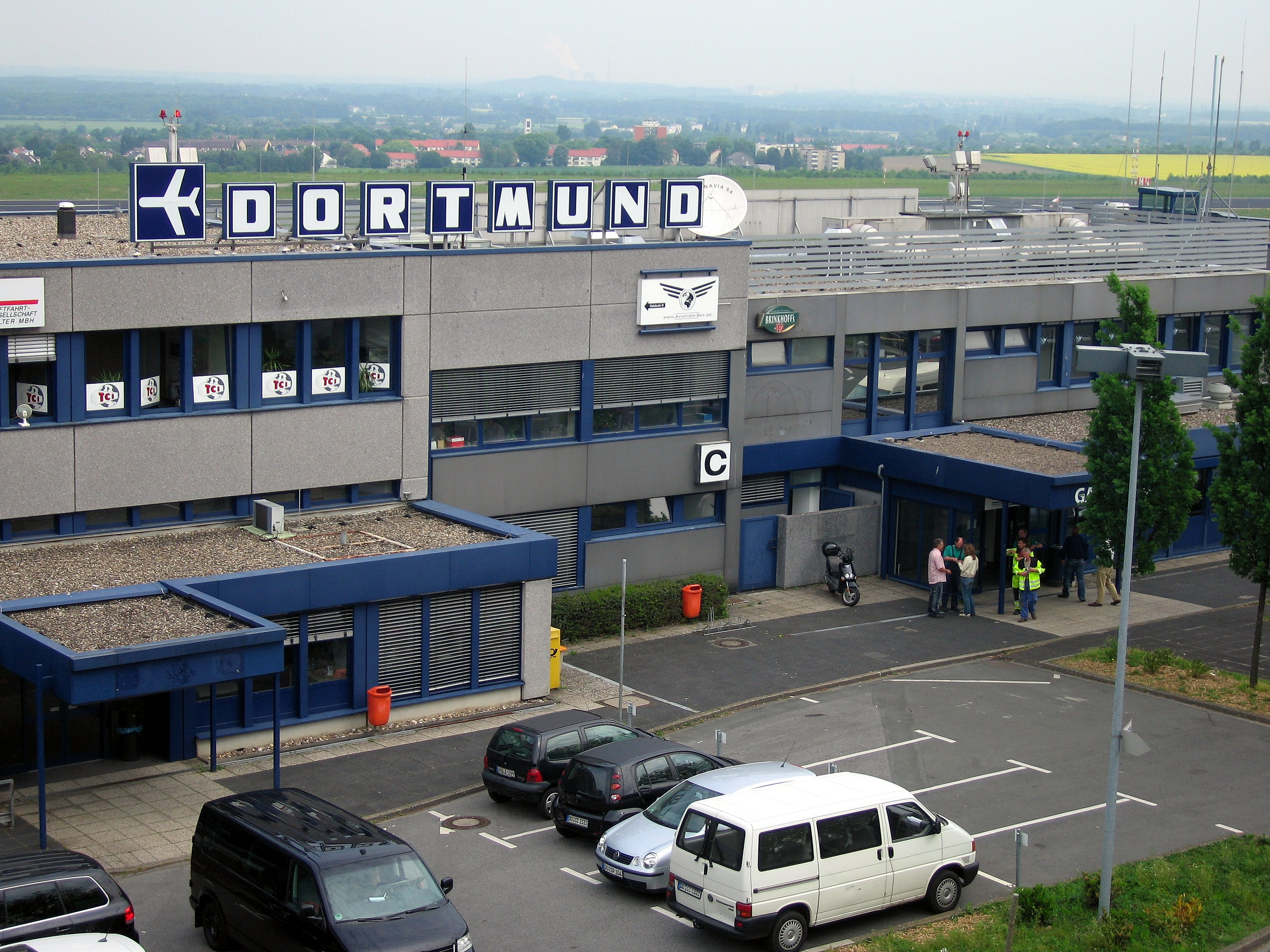 GAT-Terminal Dortmund